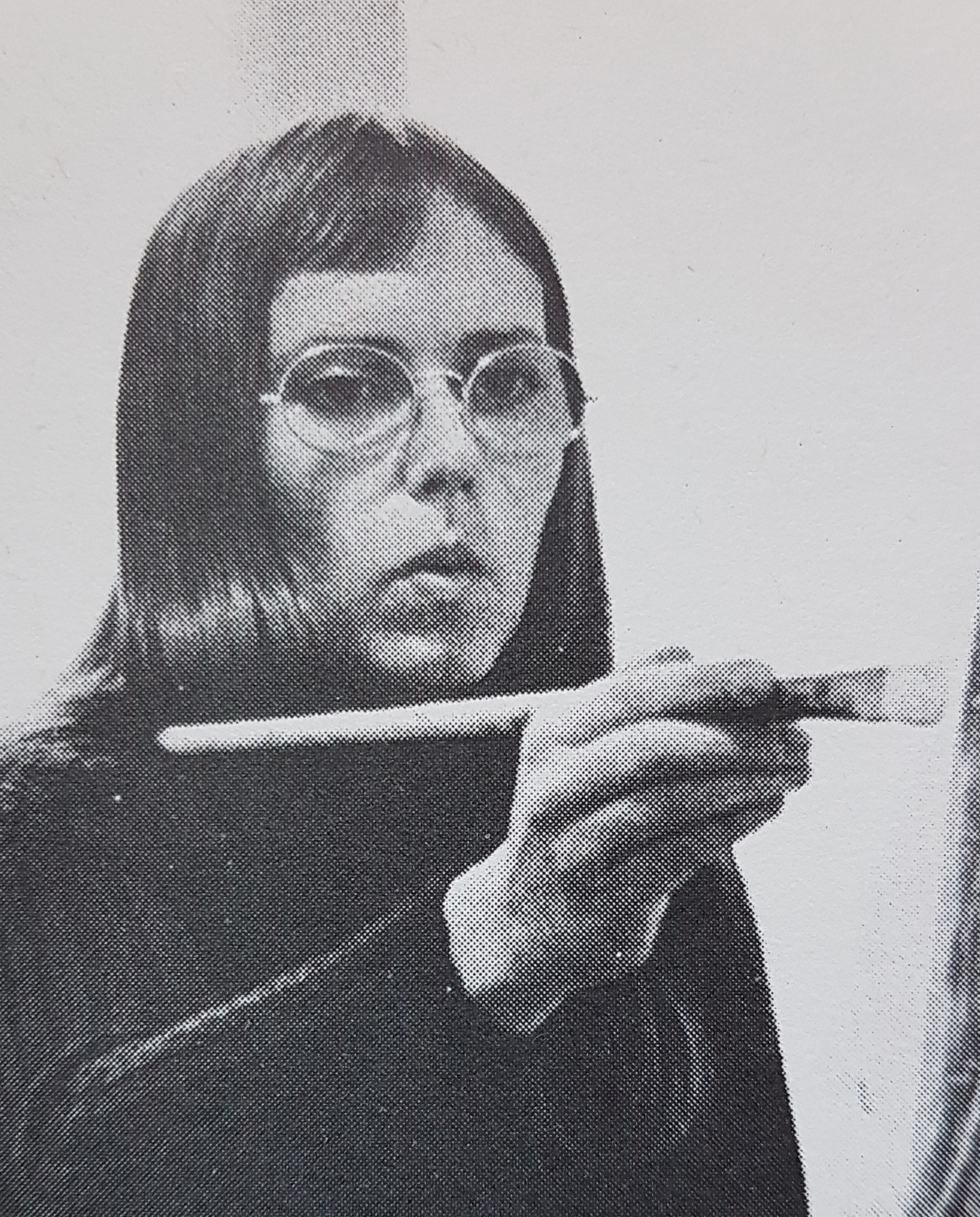 Ulla Lööf Artist from Sweden